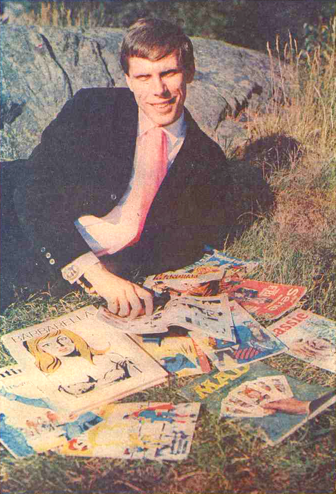 Bildtext i Dagens Nyheter 1966-08-05 (s. 29): "Sture Hegerfors, frilansjournalist i Göteborg, titulerar sig även seriehistoriker. Han tar de tecknade serierna på allvar. TV-publiken får stifta bekantskap med honom på lördagskvällen."